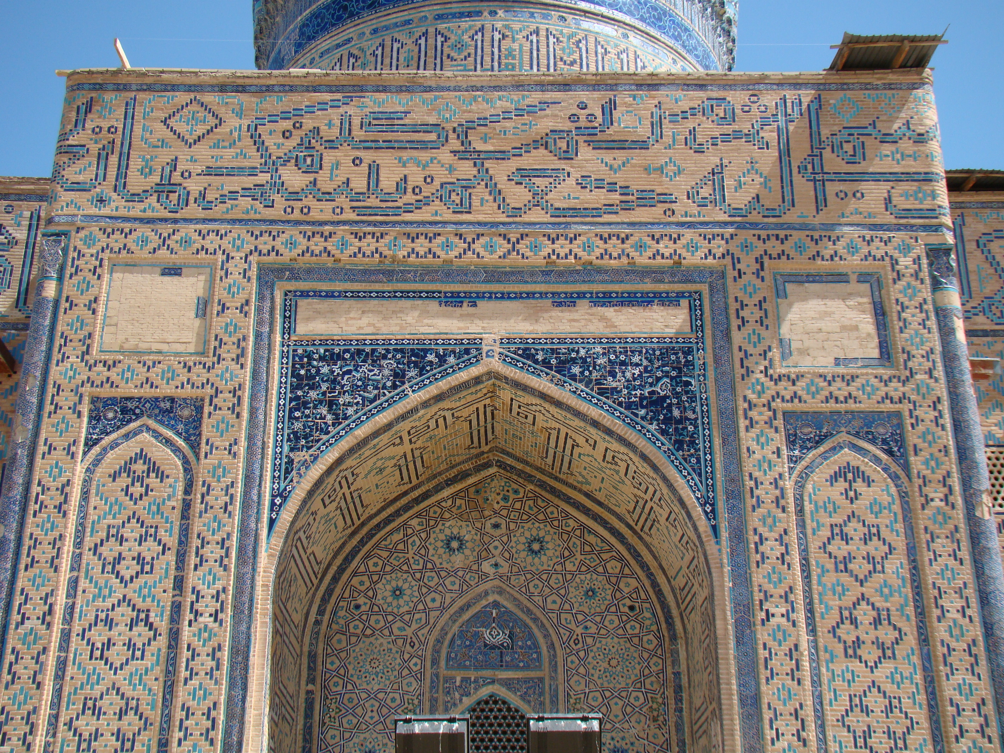 Ханака Ахмеда Ясави.